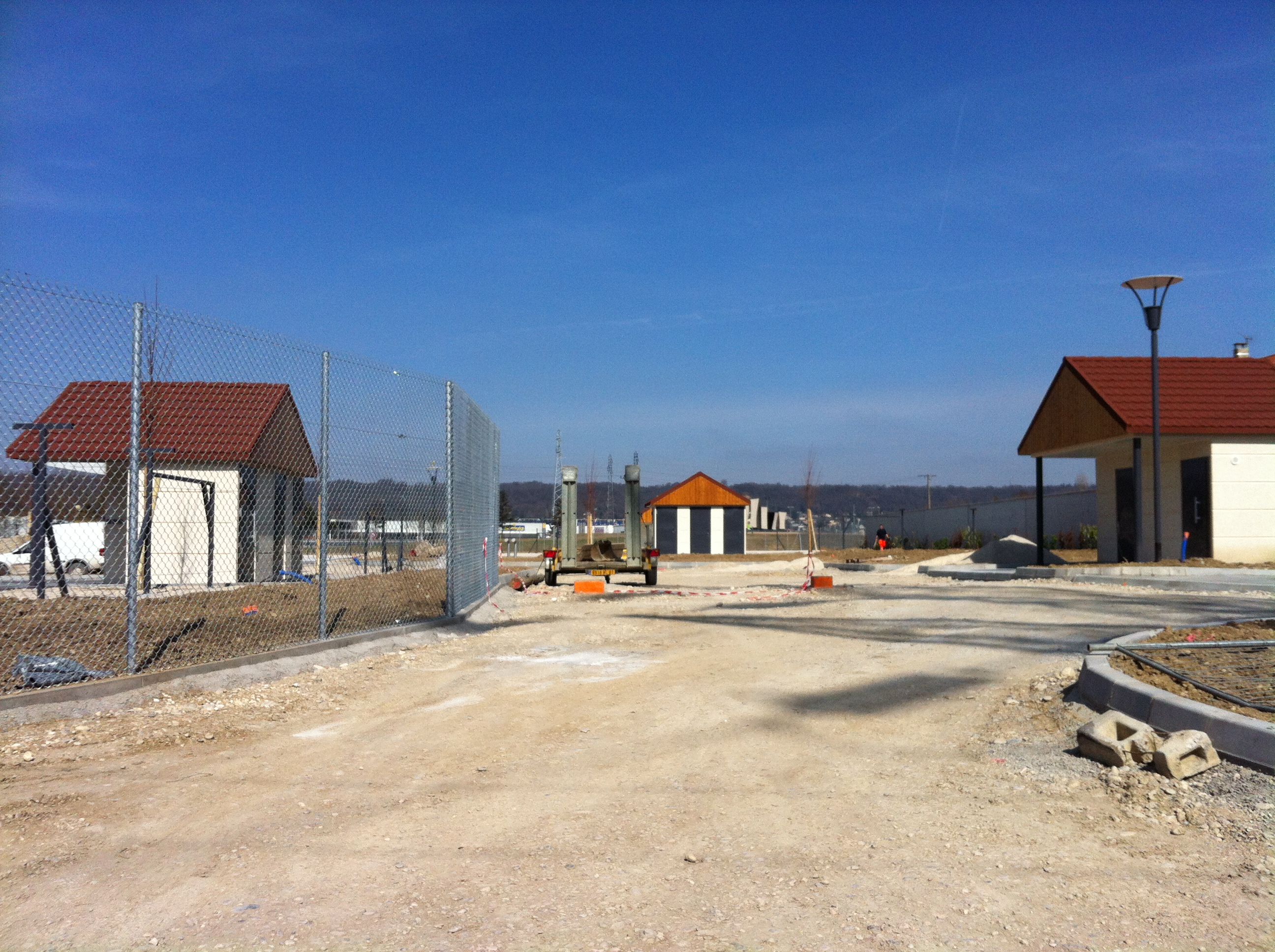 Construction de l'aire d'accueil des gens du voyage à Beynost, en mars 2012.